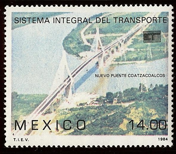 Estampilla alusiva a la Inauguración del Puente Río Coatzacoalcos, Veracruz.